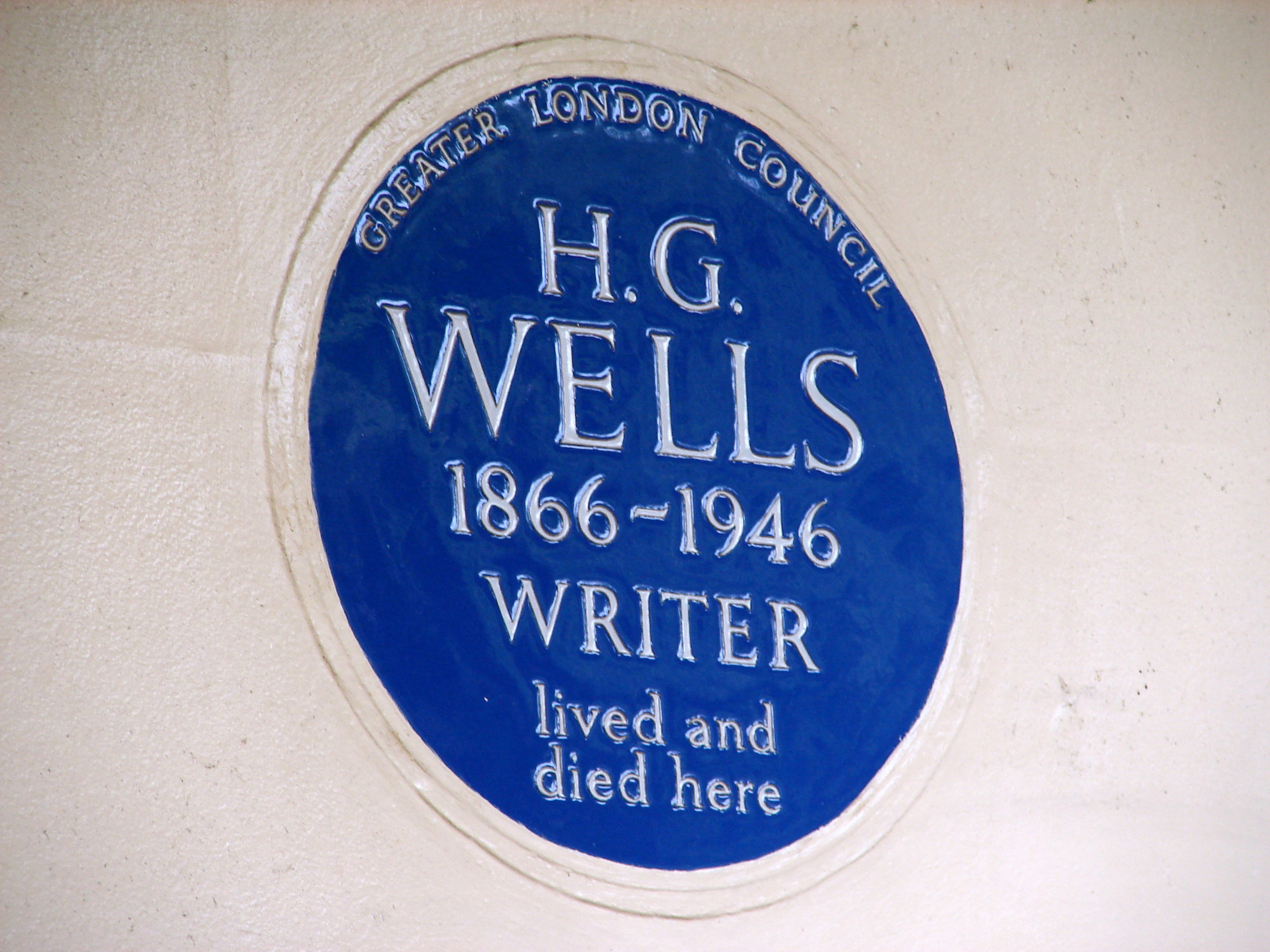 H. G. Wells